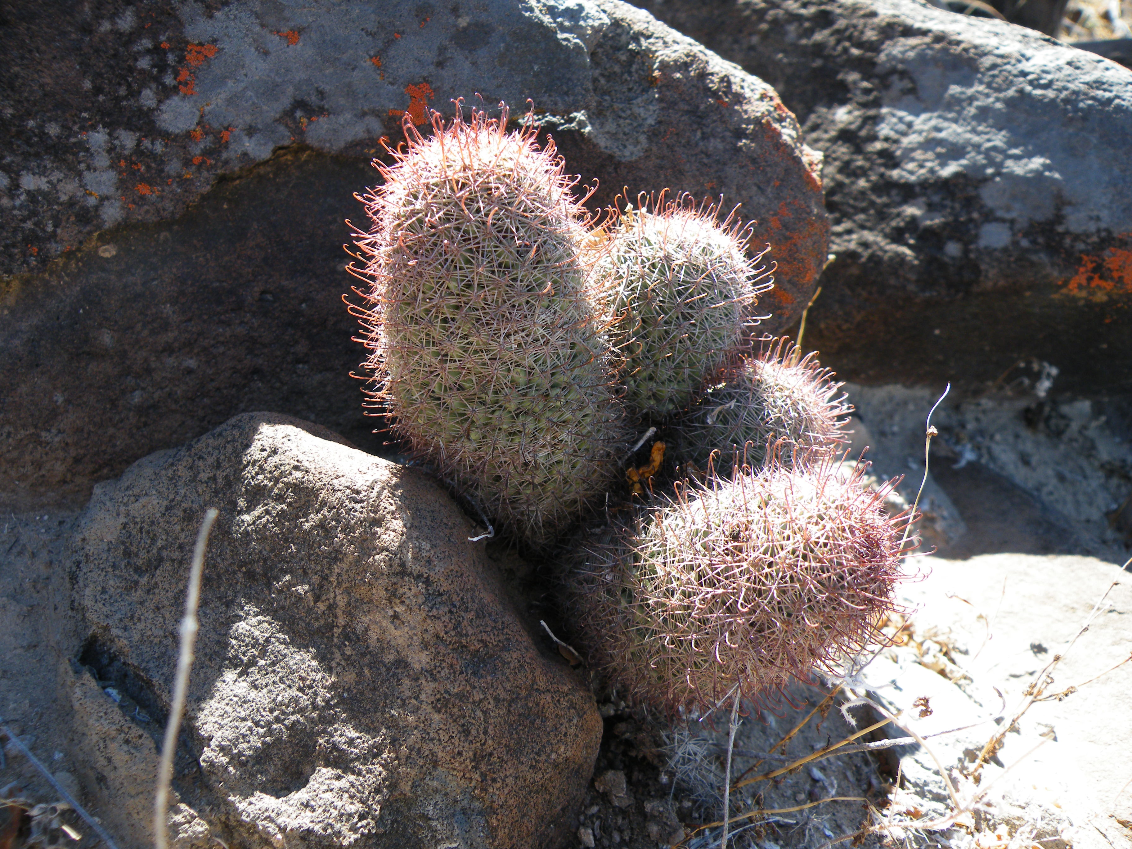 Viscaino, Baja California Sur